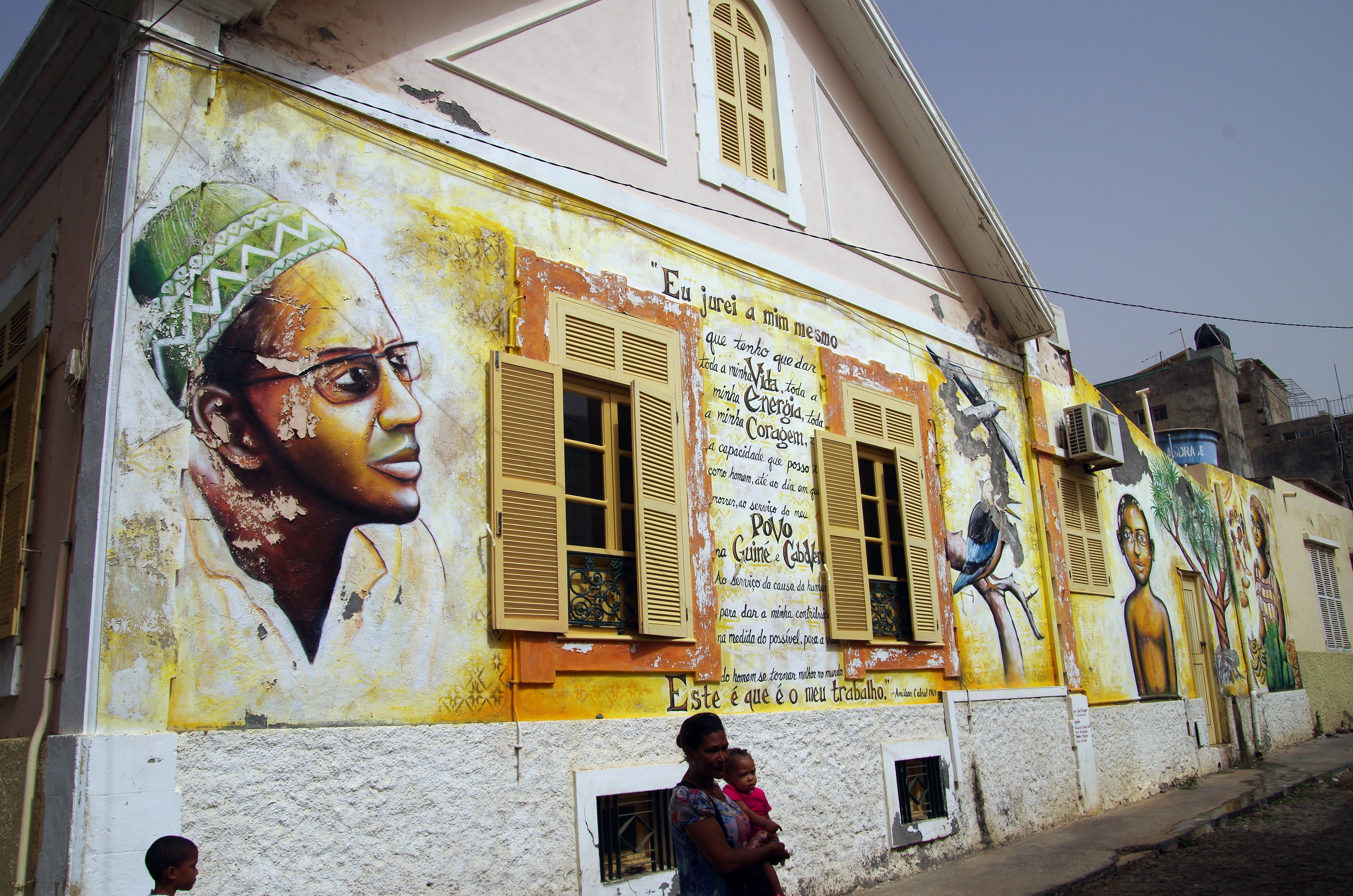 Fundação Amílcar Cabral, Praia, Kap Verde